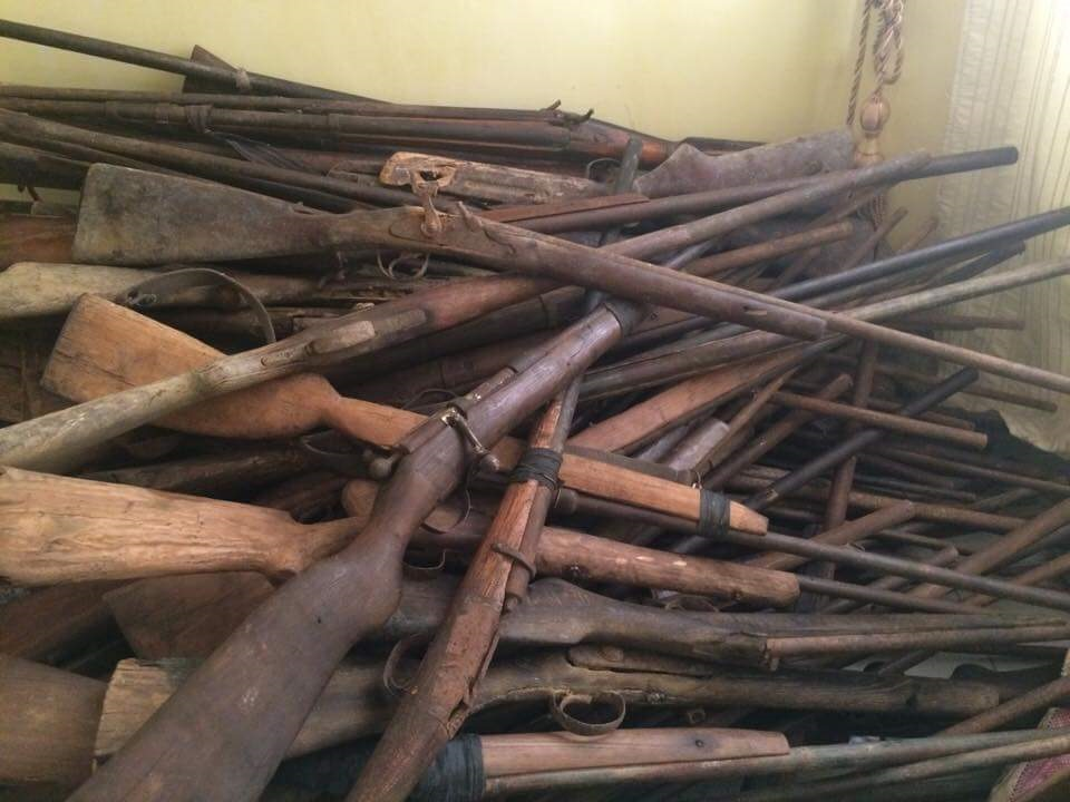 Il y a plus de fusils de chasse que d'armes de guerre dans le ramassage d'armes dans le Pool, au Congo-Brazzaville, le 23 septembre 2018. (VOA/Arsène Séverin) De nombreux habitants du Pool estiment que les armes que remettent les ex-combattants ninjas ne sont pas celles qui ont terrorisé la région pendant de longs mois du conflit armé.